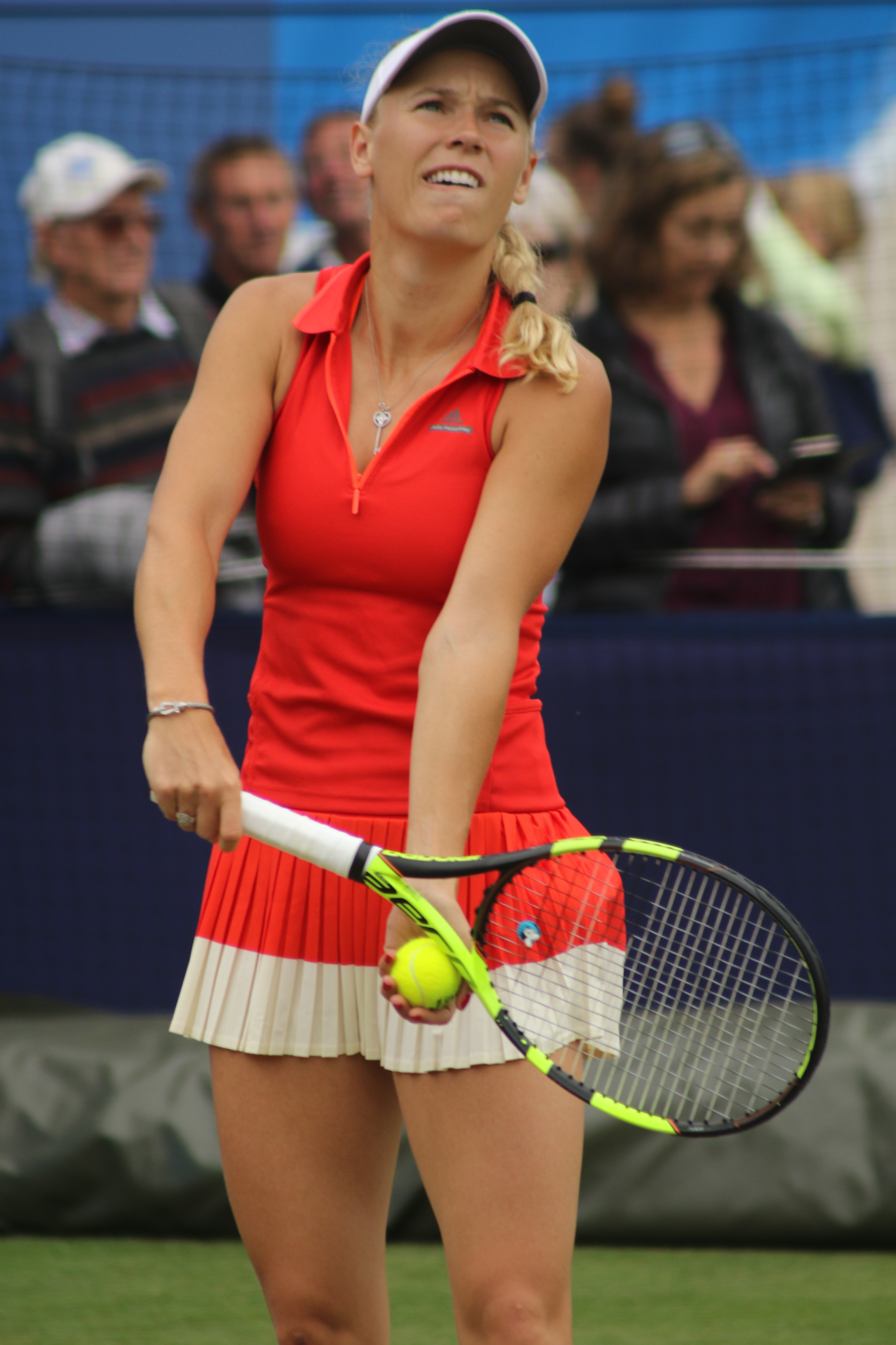 Caroline Wozniacki